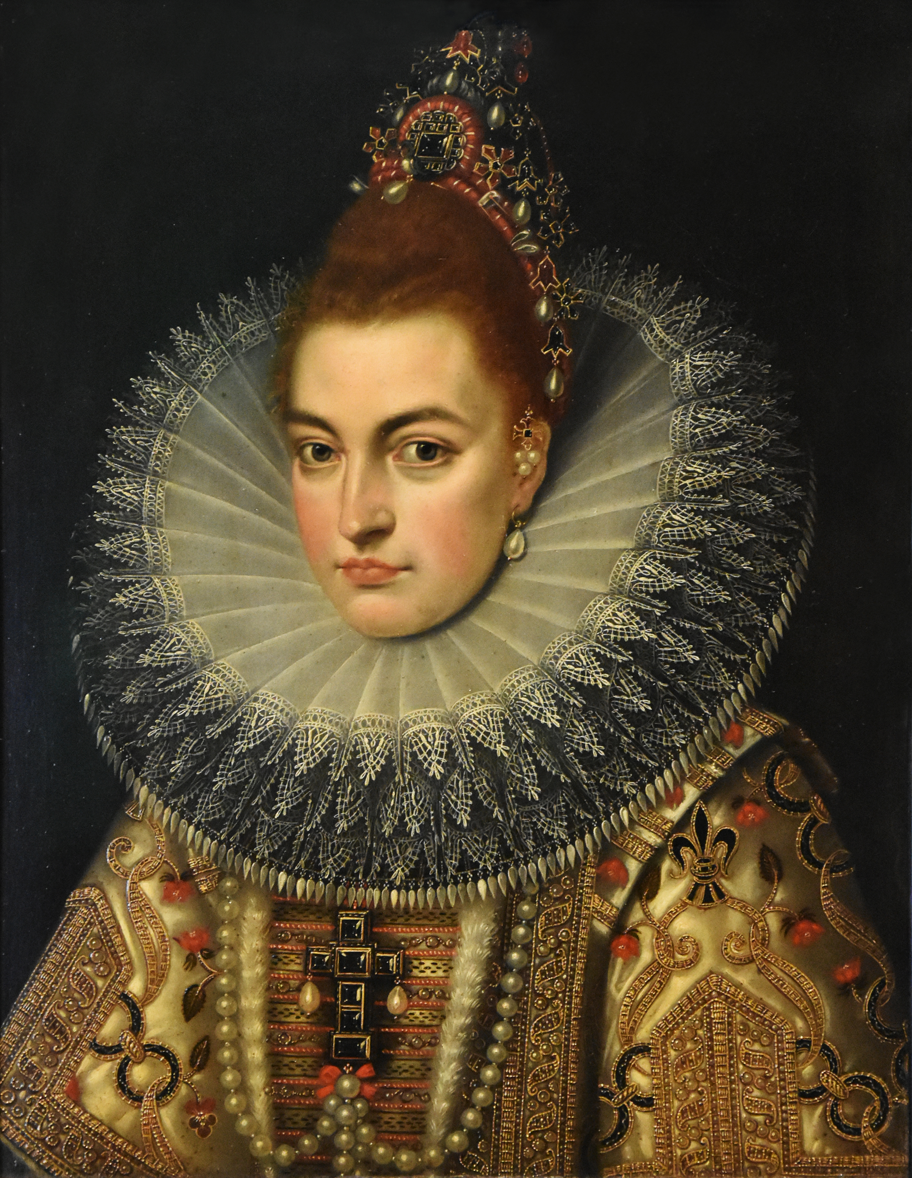 Atelier van Frans Pourbus II (1569-1622) - Portret van aartshertogin Isabella -Noordbrabants Museum 's-Hertogenbosch